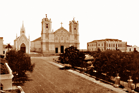 A Capela do Divino Espírito Santo, a Antiga Matriz e a Casa da Junta, na Praça da Matriz